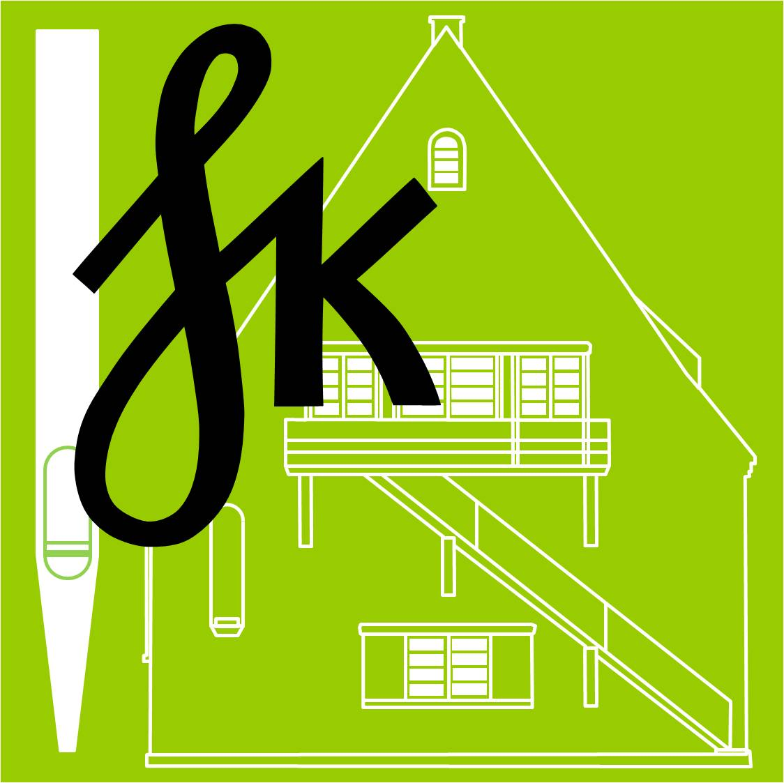 Logo des "Förderverein Hugo Körtzinger e.V."